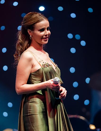 Rola Saad is a Lebanese pop singer.